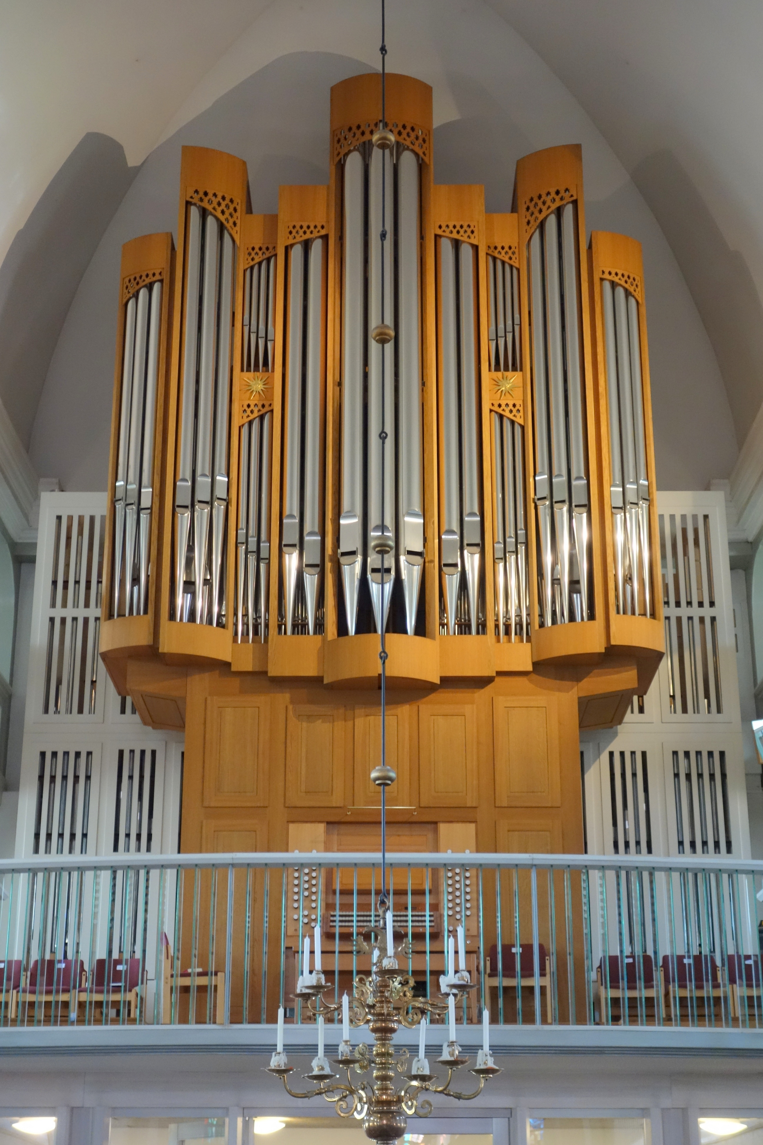 St. Peter und Paul Bad Oldesloe, Kreis Stormarn, Schleswig-Holstein, Deutschland